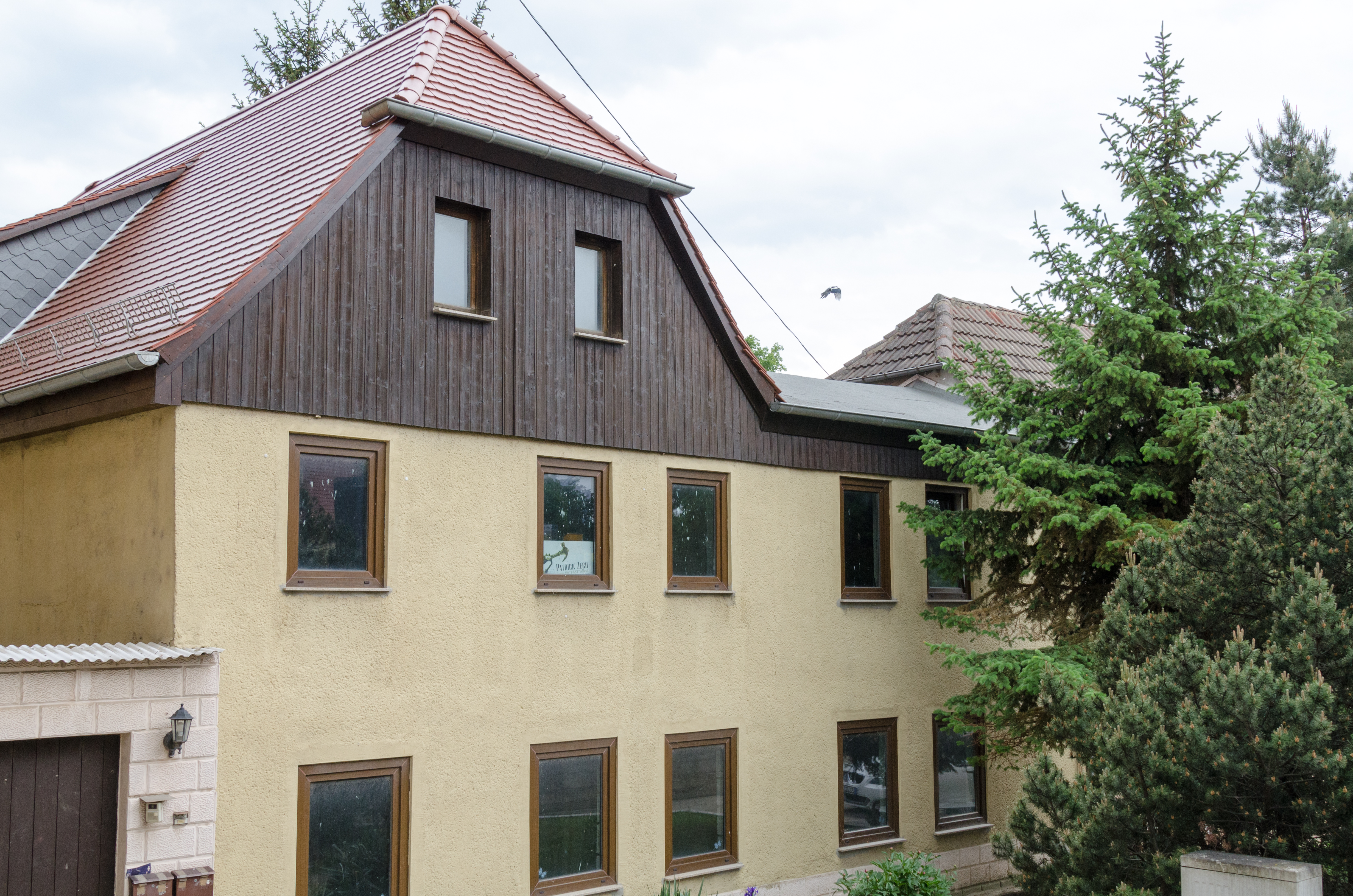 Zeitz, Badstubenvorstadt 2